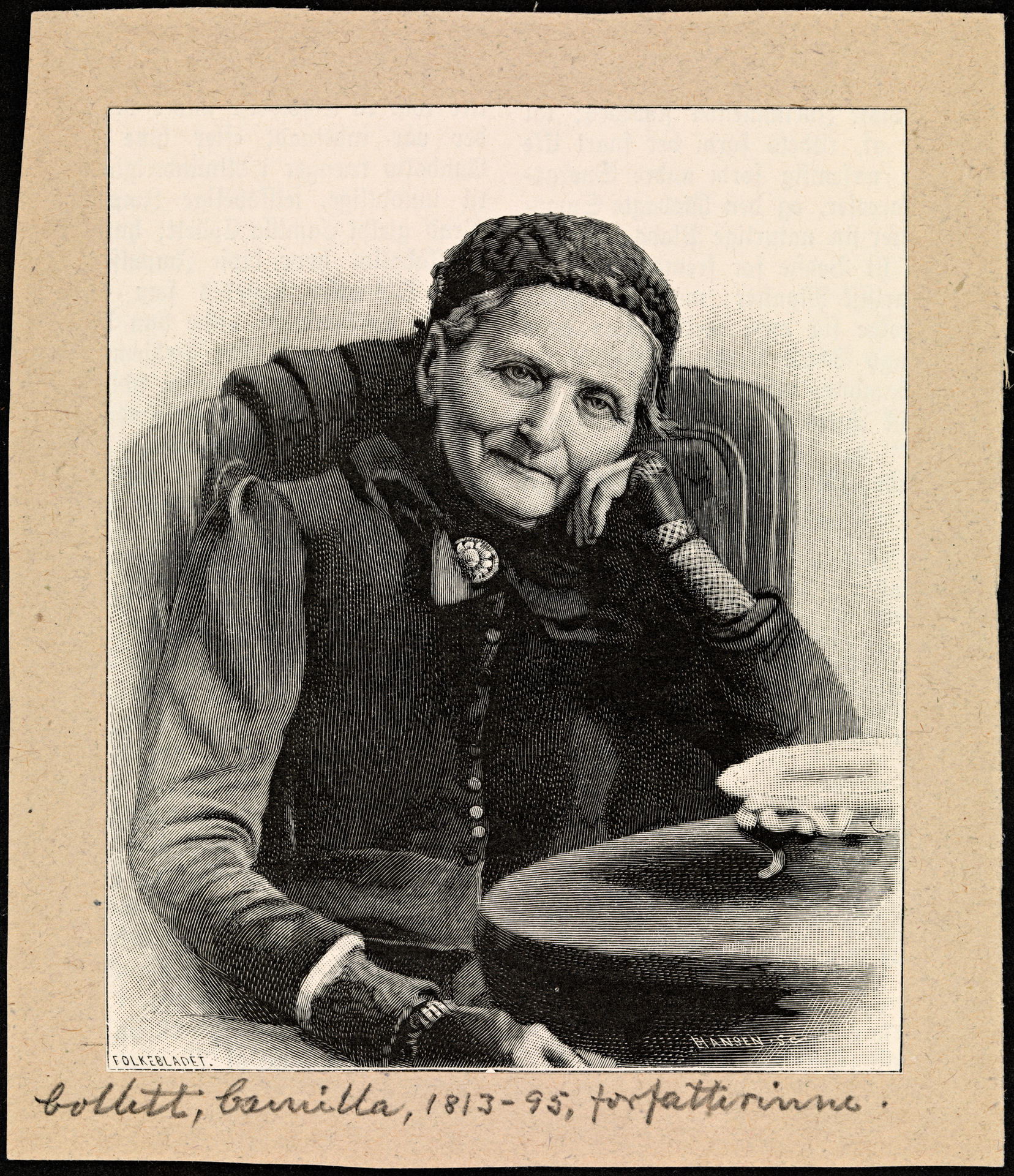 Tittel / Title: Portrett av Camilla Collett, 1893 Motiv / Motif: Xylografi etter fotografi tatt av Robert Collett i 1893. Xylografiet har stått på trykk i Folkebladet. Dato / Date: 1893 Fotograf / Photographer: Robert Collett (1842-1913) Xylograf: Hansen Eier / Owner Institution: Nasjonalbiblioteket / National Library of Norway Lenke / Link: Bildesignatur / Image Number: blds_04515